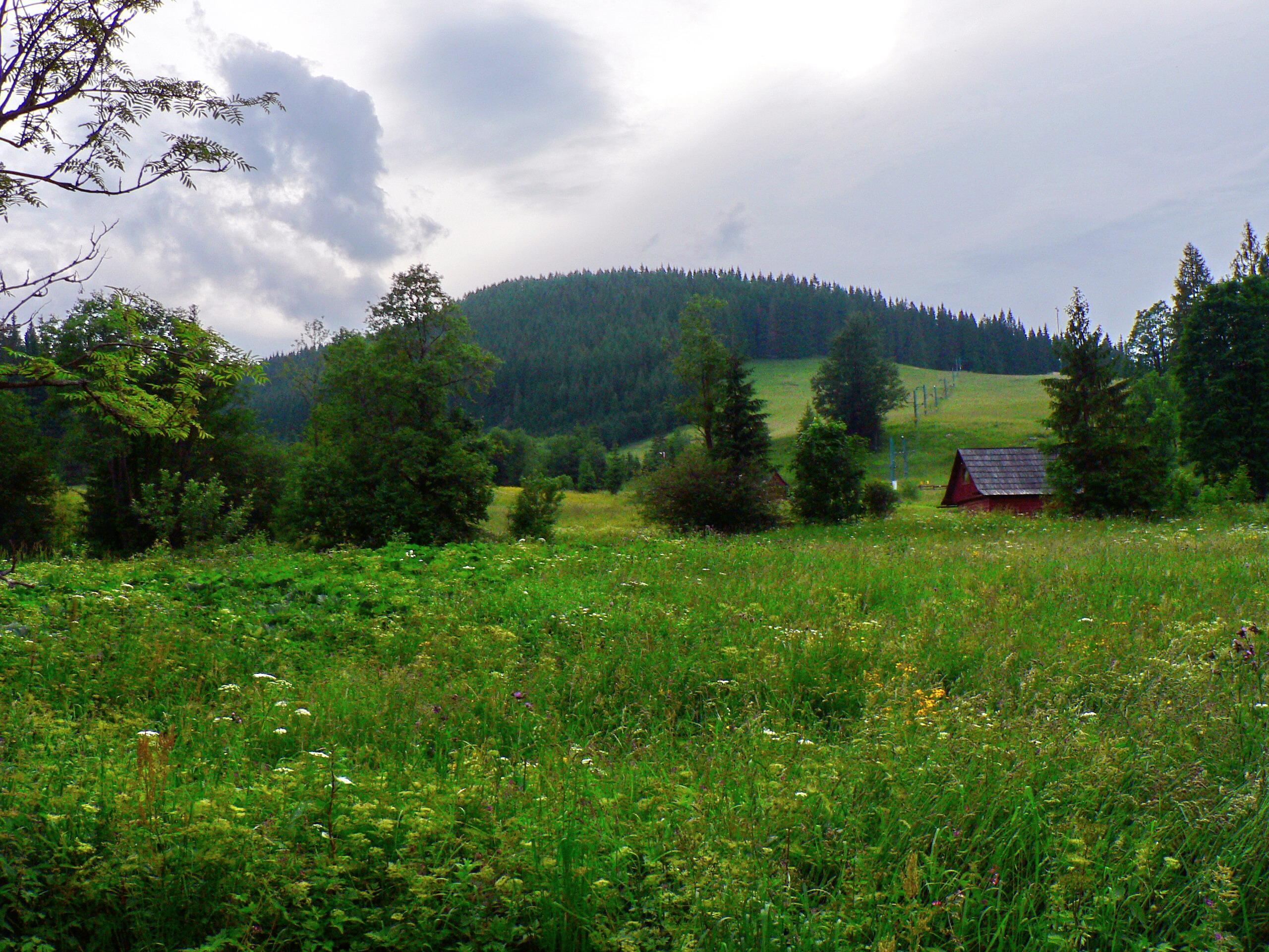 Gombosi Wierch z Jaworzyny Spiskiej